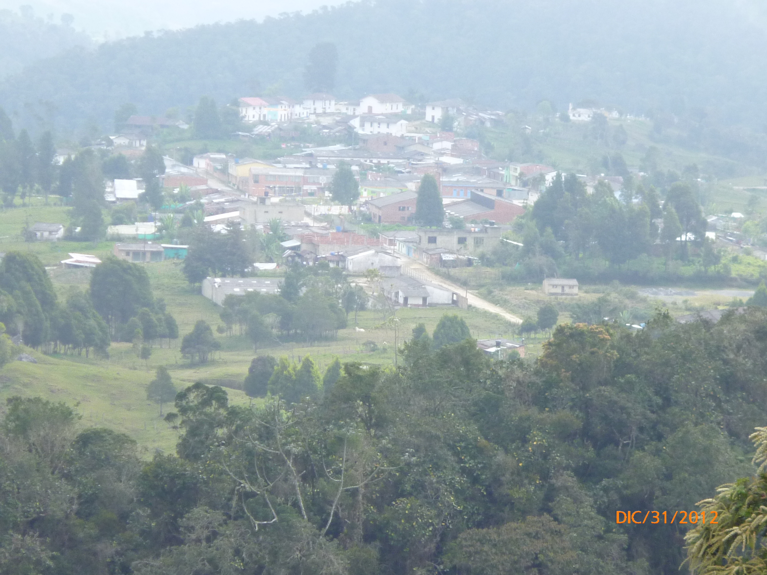 foto de Sabanagrande tomada desde la Esperanza